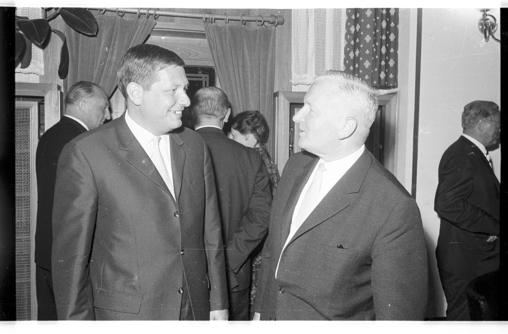 im Rathaus. Gäste im Ratssaal. Im Bild Stadtbaurat Klaus Müller-Ibold (links) im Gespräch mit seinem Vorgänger Prof. Herbert Jensen (rechts).